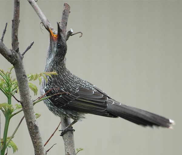 Bird, Little Wattlebird, Anthochaera chrysoptera